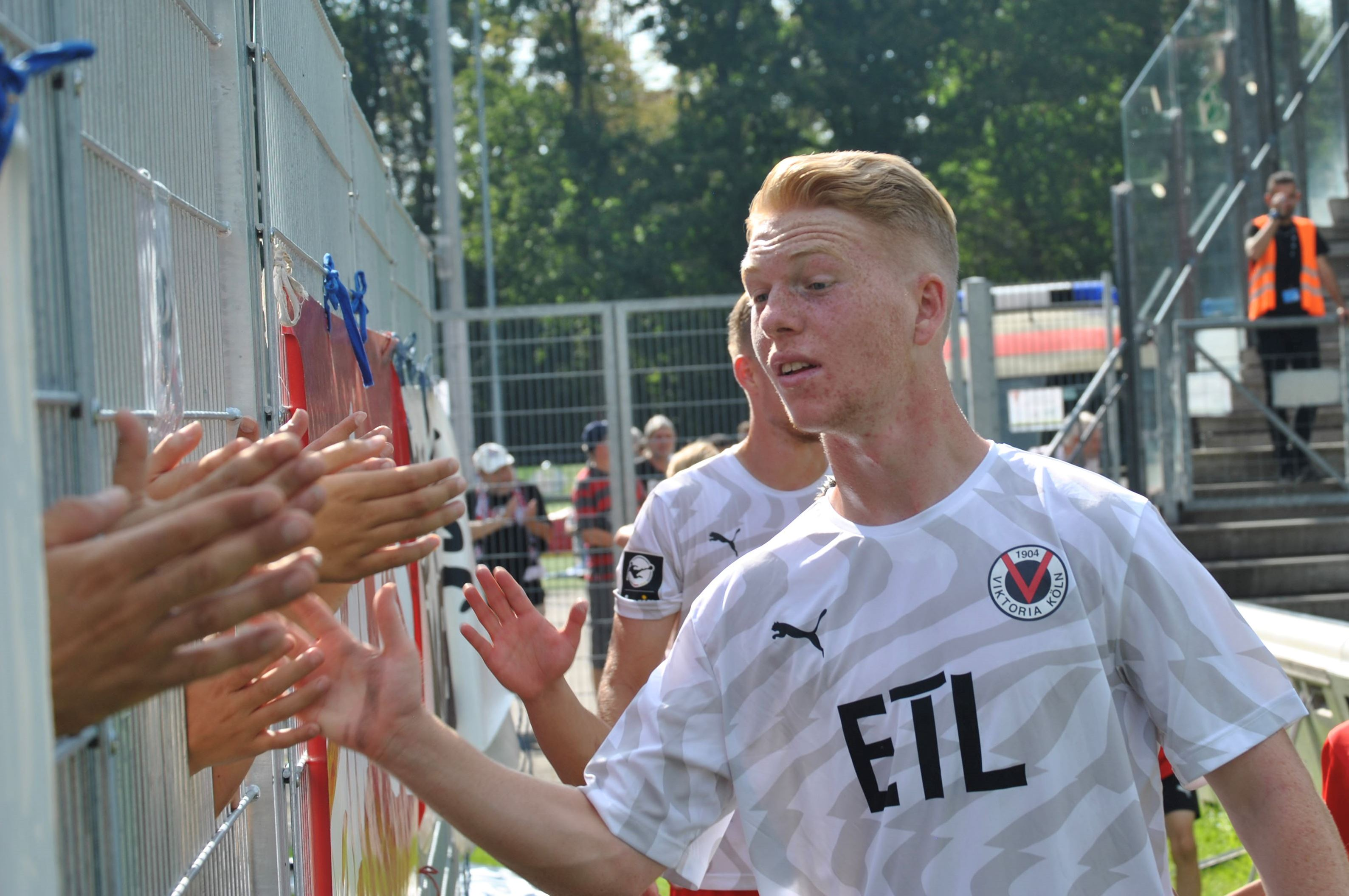 Kai Klefisch (FC Viktoria Köln) am 31.08.2019 nach dem Heimspiel gegen Ingolstadt